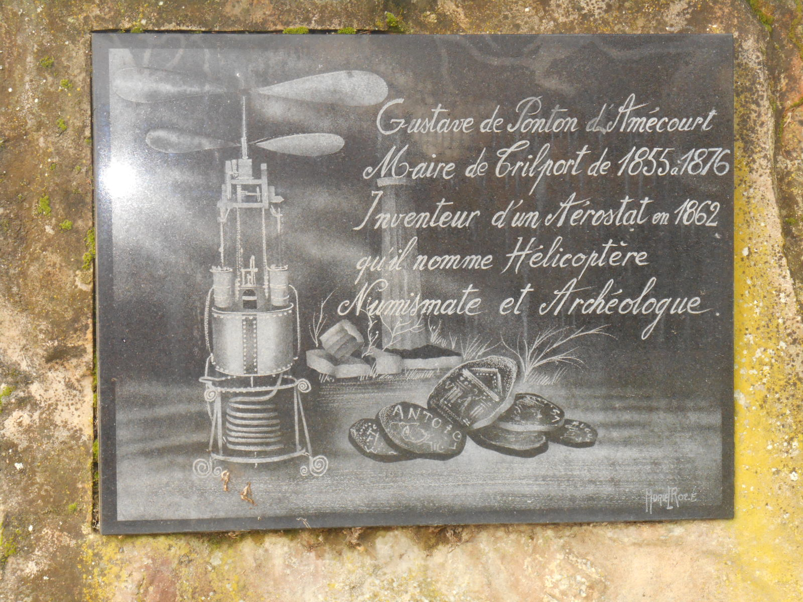 Plaque en hommage à Gustave Ponton d'Amécourt